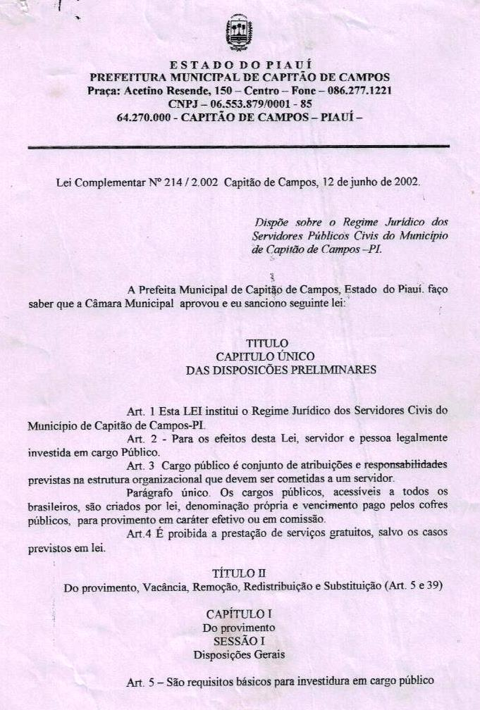 Parte inicial da Lei Municipal do Regime Jurídico dos Servidores Públicos do Município de Capitão de Campos.